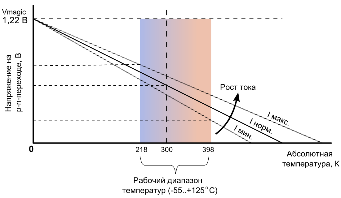 Принцип работы бандгапа (источника опорного напряжения типа bandgap) - зависимость напряжения на p-n-переходе от температуры и тока